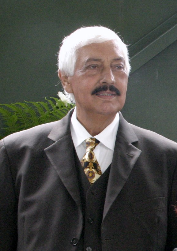 Hugo Adolf Höllenreiner (1933 - 2015) war ein deutscher Sinto und Überlebender des Porajmos (Völkermord an den europäischen Roma in der Zeit des Nationalsozialismus). Er engagierte sich seit Ende der 1990er Jahre als Zeitzeuge. Hier während während eines Fototermins am 27. April 2009 nach dem Eintreffen des Zuges der Erinnerung in München am selben Tag. Titel: "Hugo Höllenreiner (2009)"